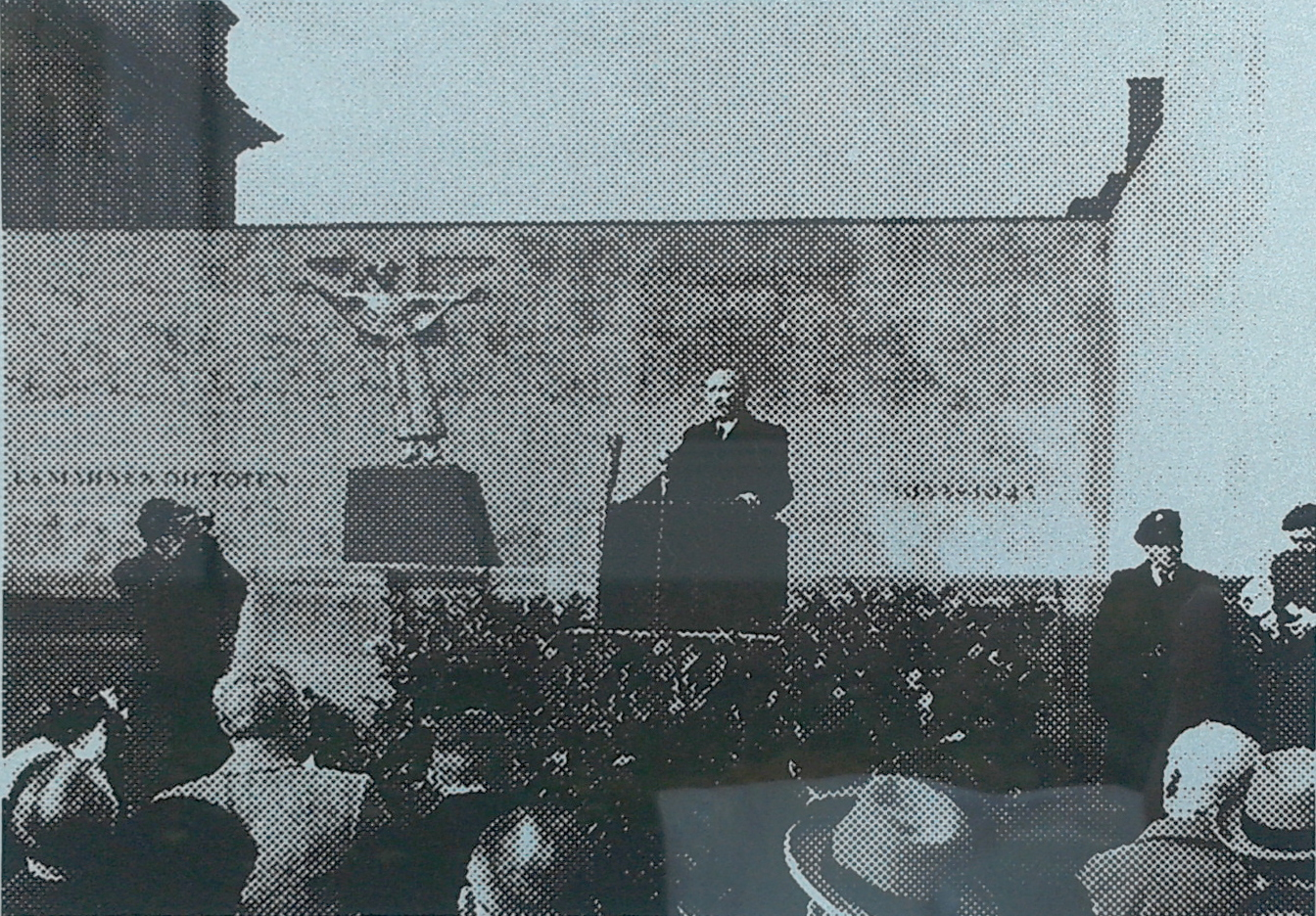 Gedenktafel Friedensengel E6, Mannheim: Konrad Adenauer eröffnet Friedensengel in B4